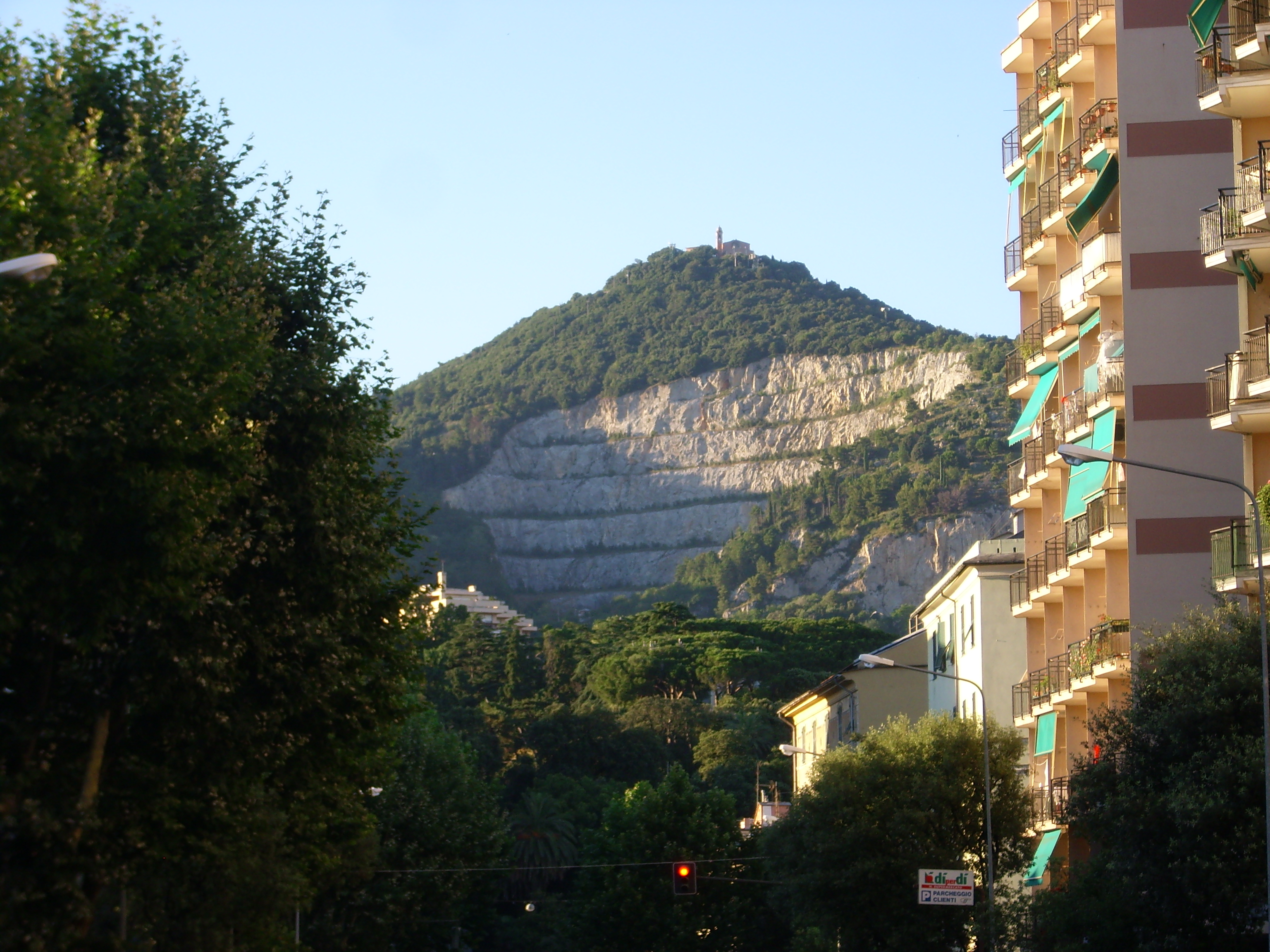 Il Monte Gazzo, con i segni dell'attività estrattiva, sopra l'abitato di Sestri Ponente.